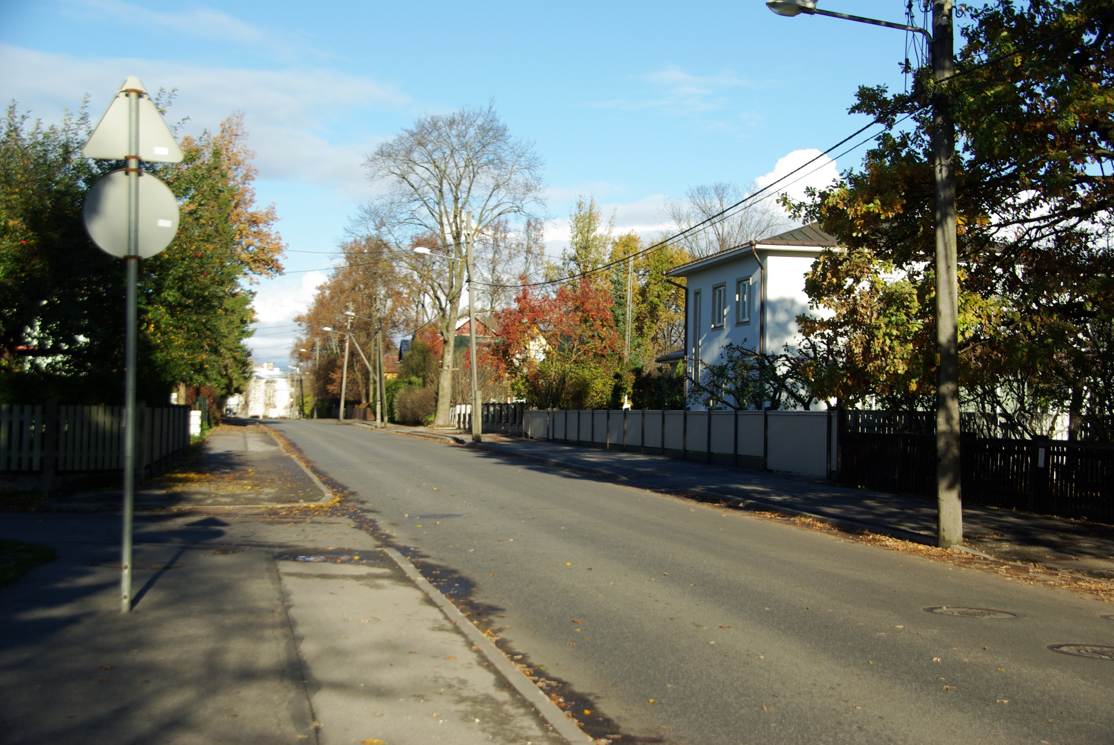 tänav Tartus Tammelinnas